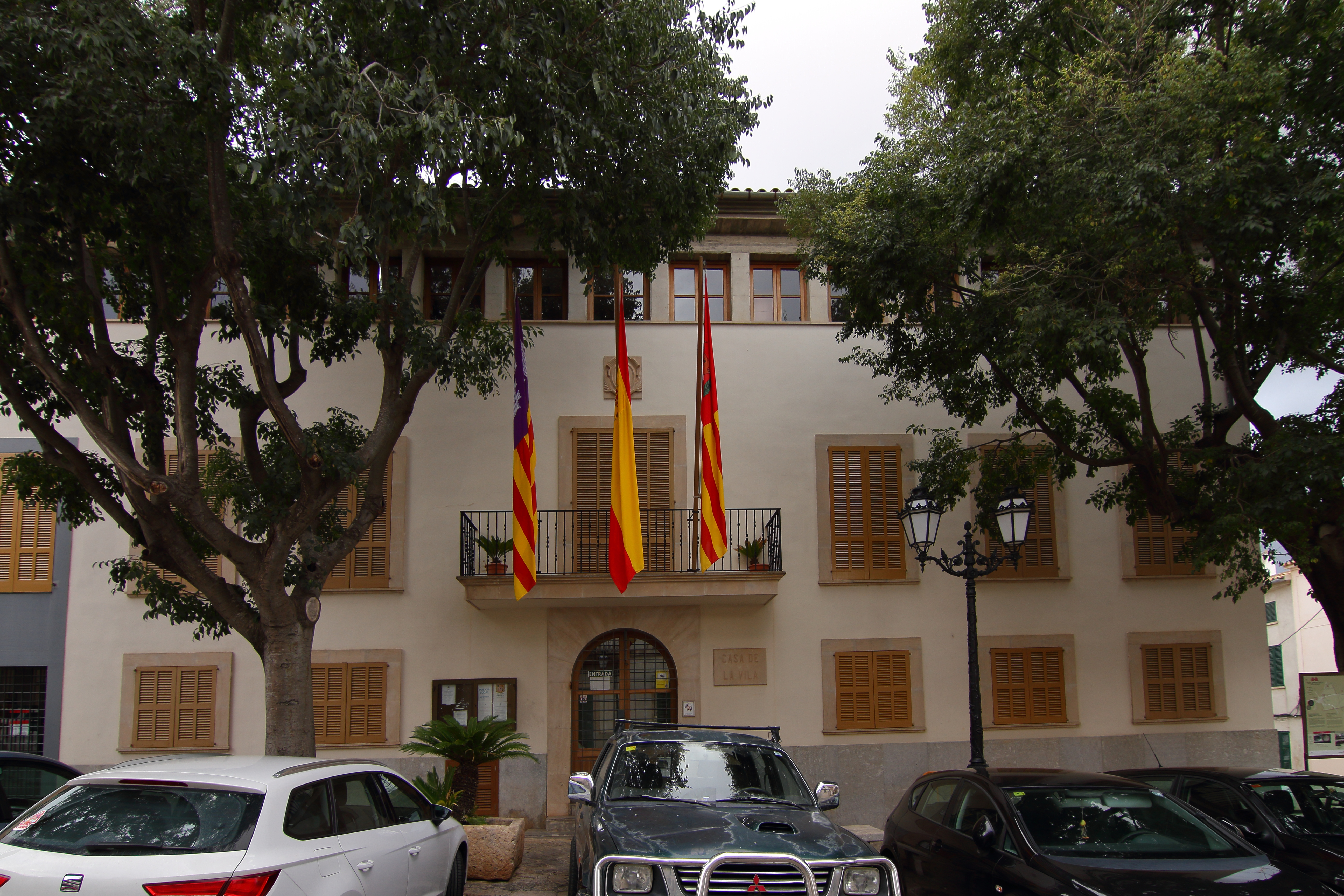 Sencelles, Ayuntamiento